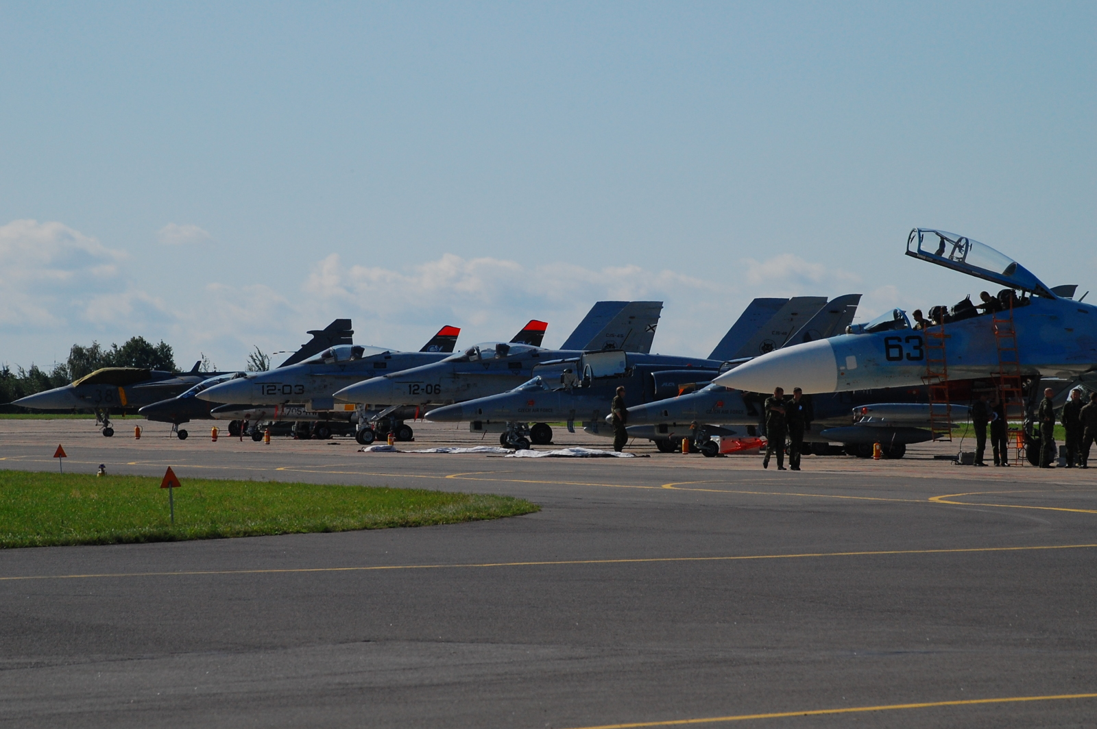 Samoloty na płycie postojowej podczas Air Show 2009 w Radomiu. Na pierwszym planie Su-27UB Białoruskich Sił Powietrznych, który uległ katastrofie drugiego dnia pokazów 30 sierpnia 2009.